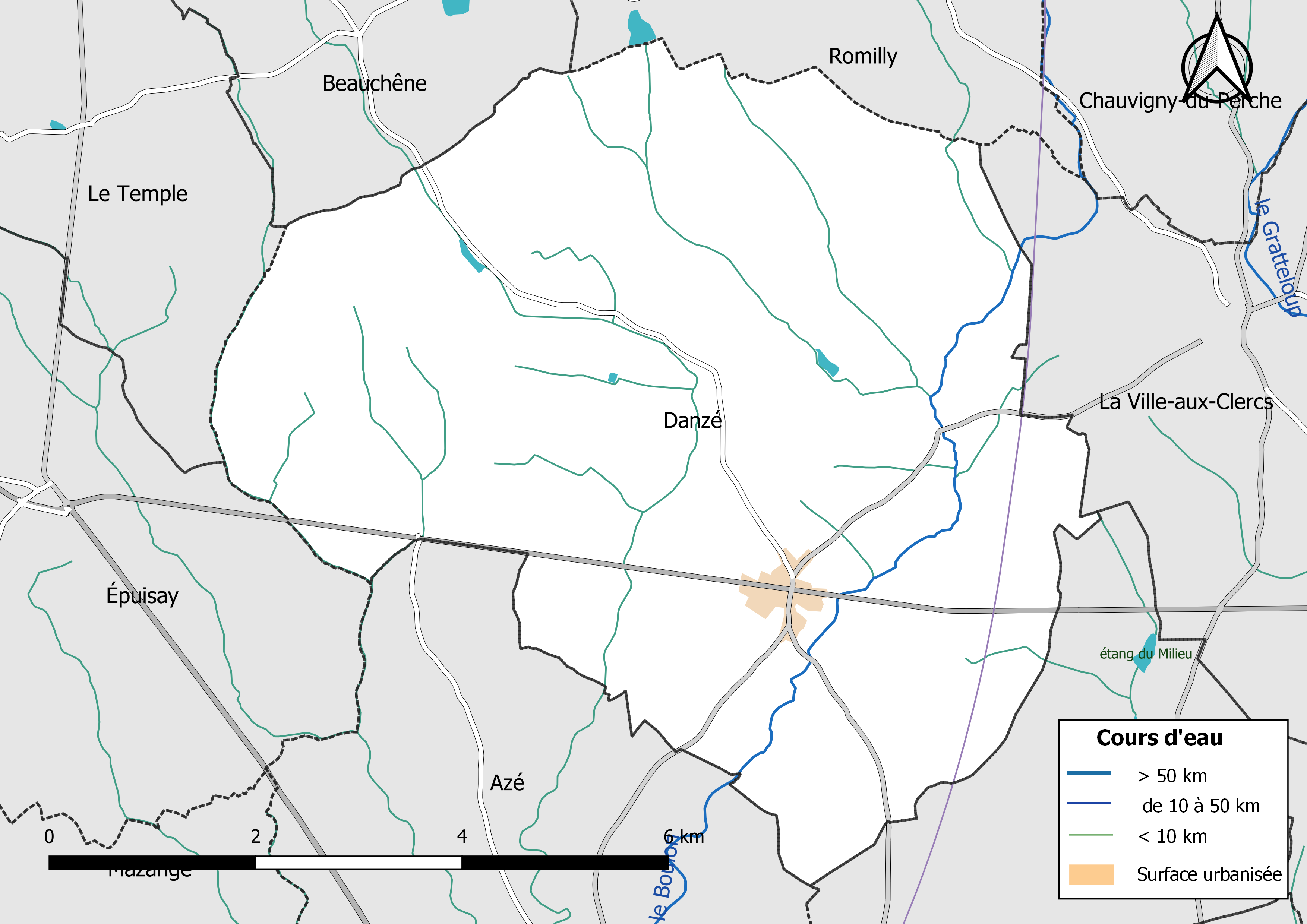 Carte du réseau hydrographique de la commune de Danzé (Loir-et-Cher, France).